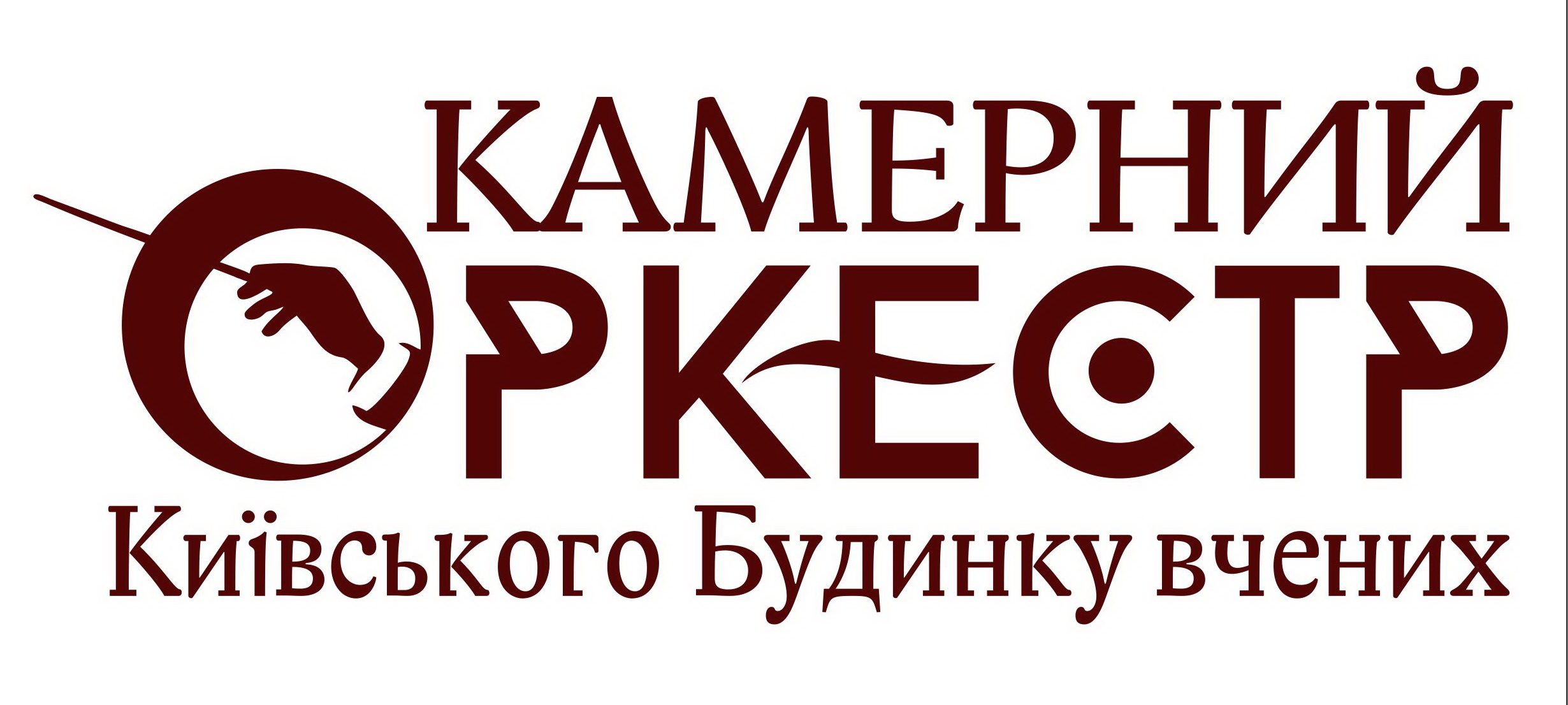 Офіційний логотип колективу Камерний оркестр київського Будинку вчених НАНУ.